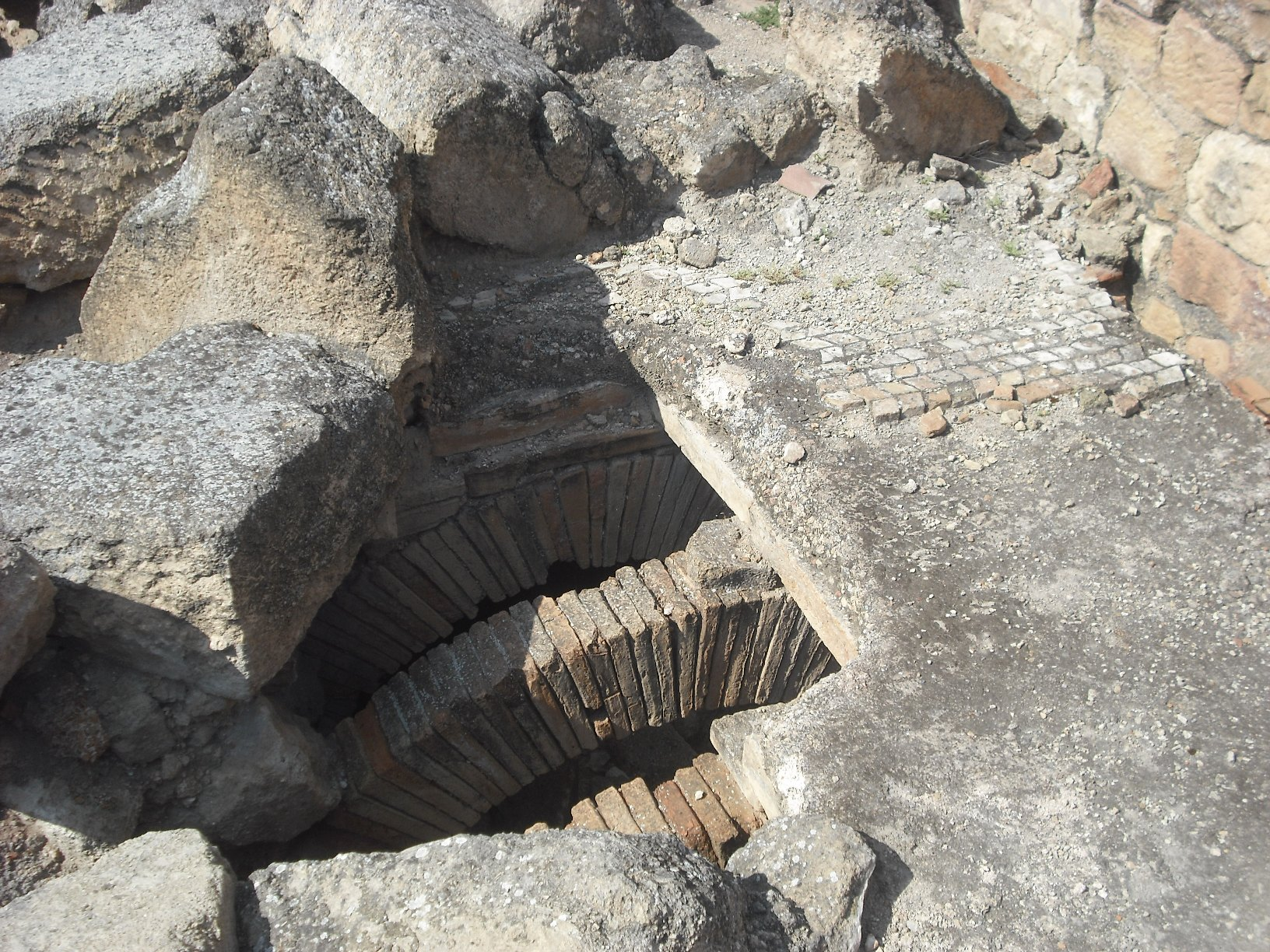 Arcs soterranis conservats al caldarium masculí de les Termes de Mura (Llíria).